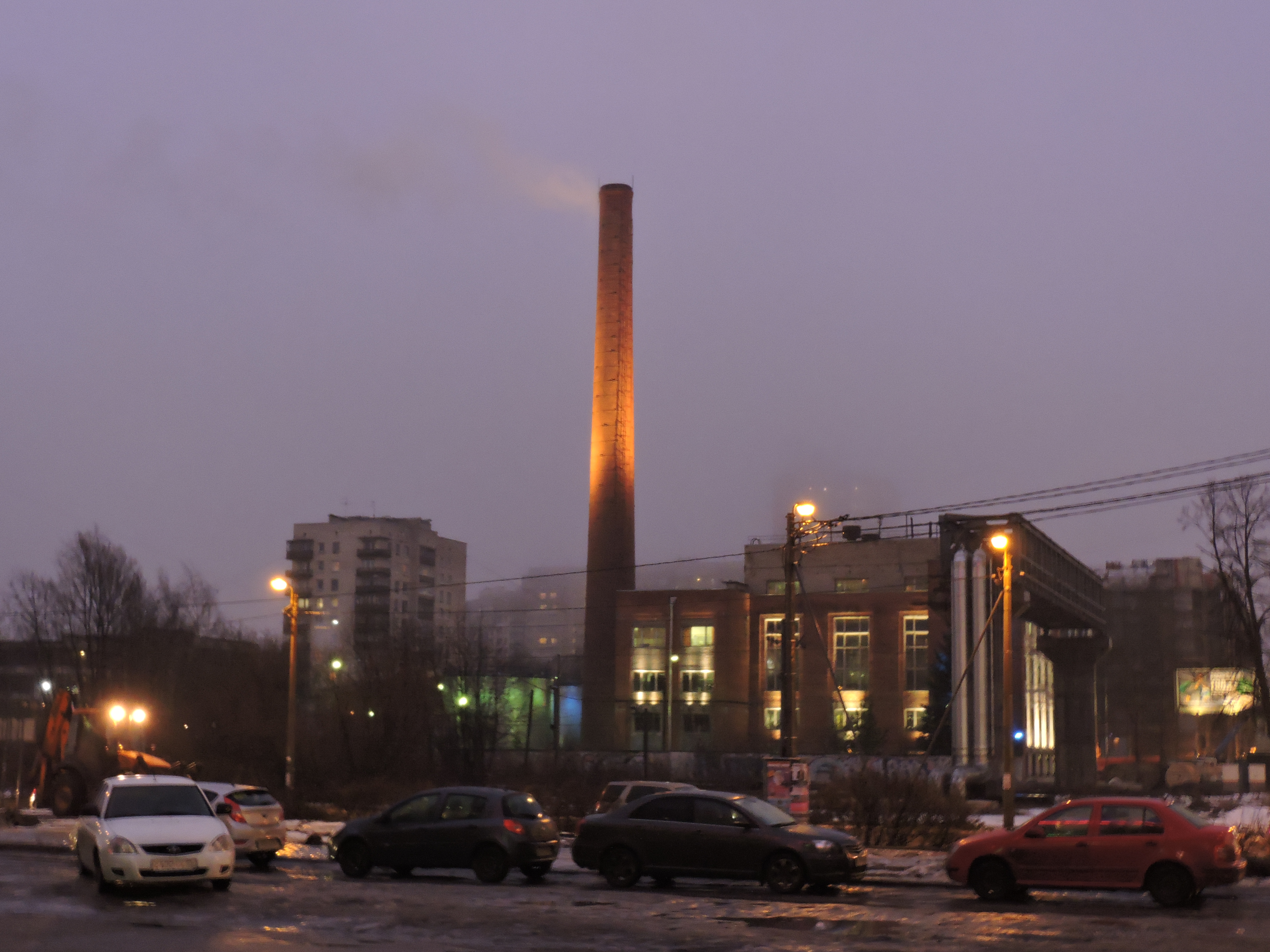 Котельная "Липовая аллея". Дымовая труба с подсветкой